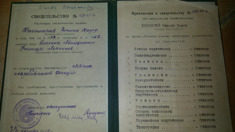 Rezultate ne Shkolle